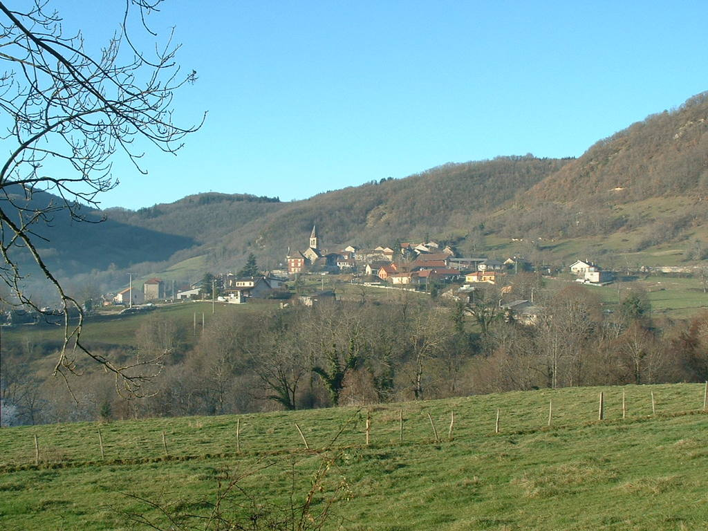 Le village de Bénonces dans l'Ain